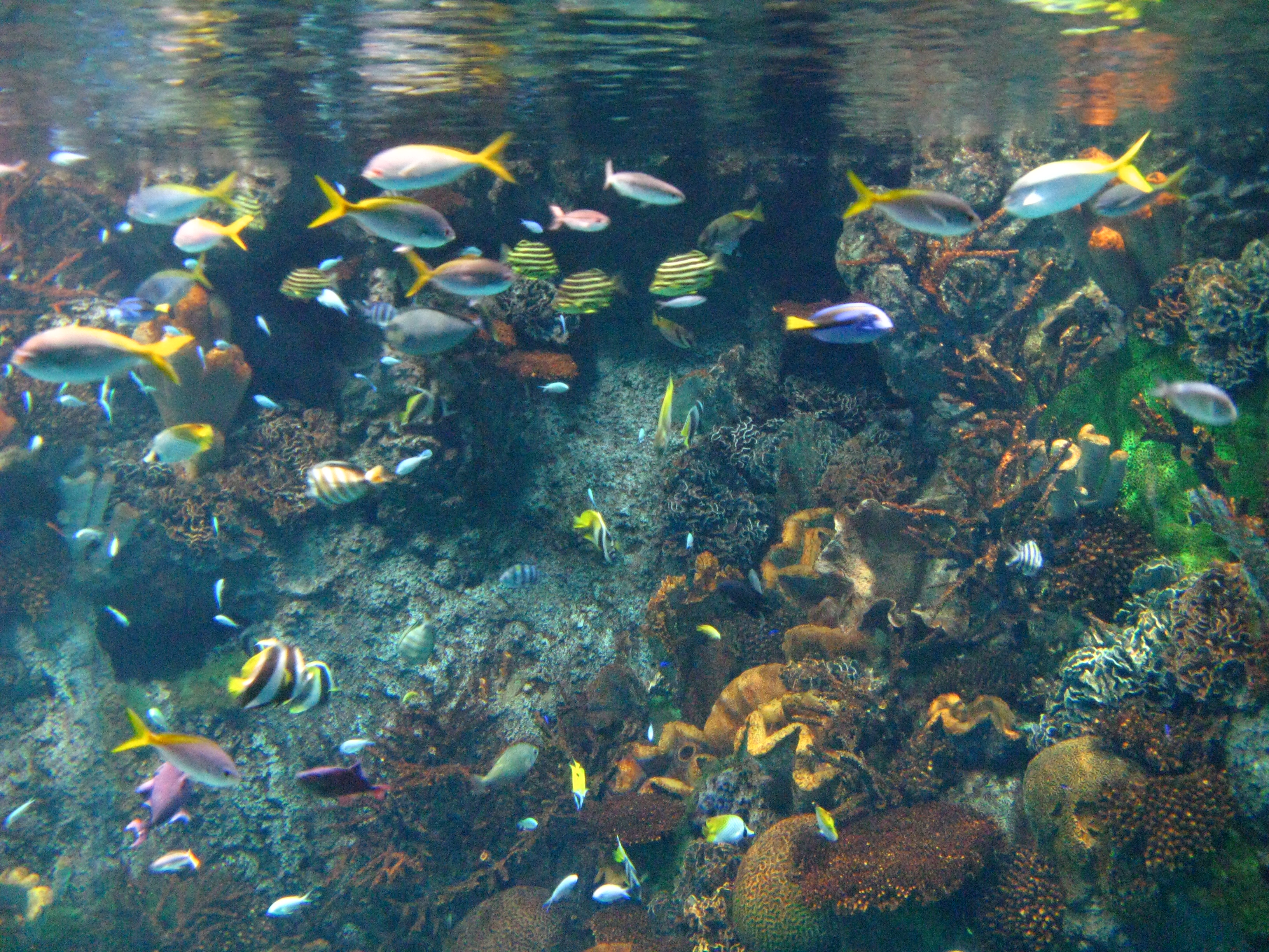 海遊館